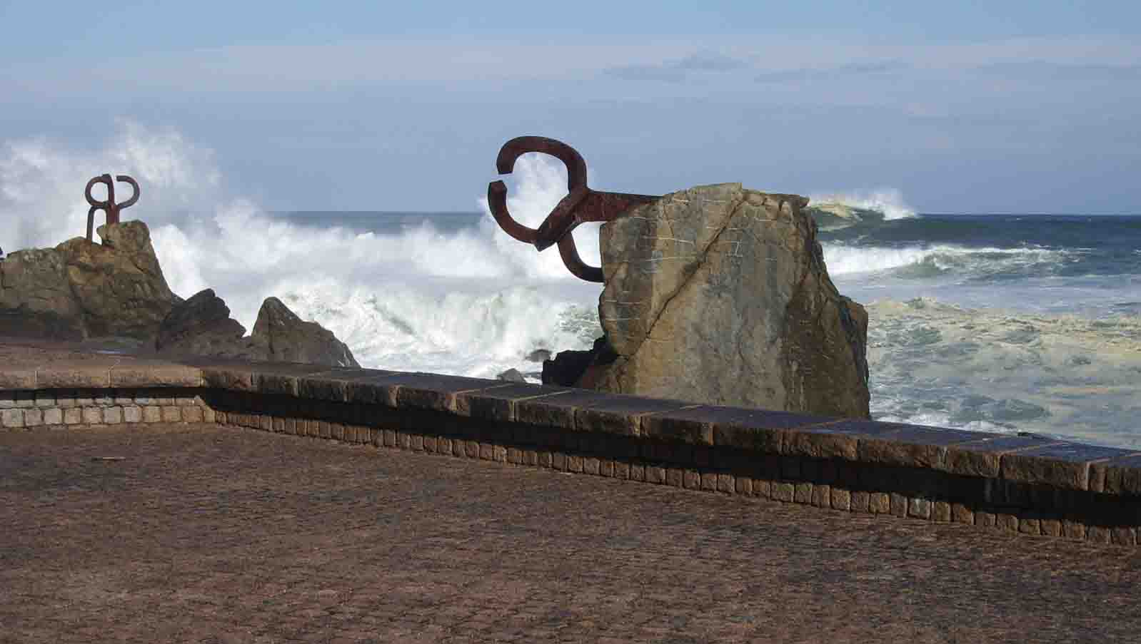 Donostiako Haize Orrazia, eskultorea Eduardo Txillida Juantegi eta arkitektoa Luis Peña Gantxegi.